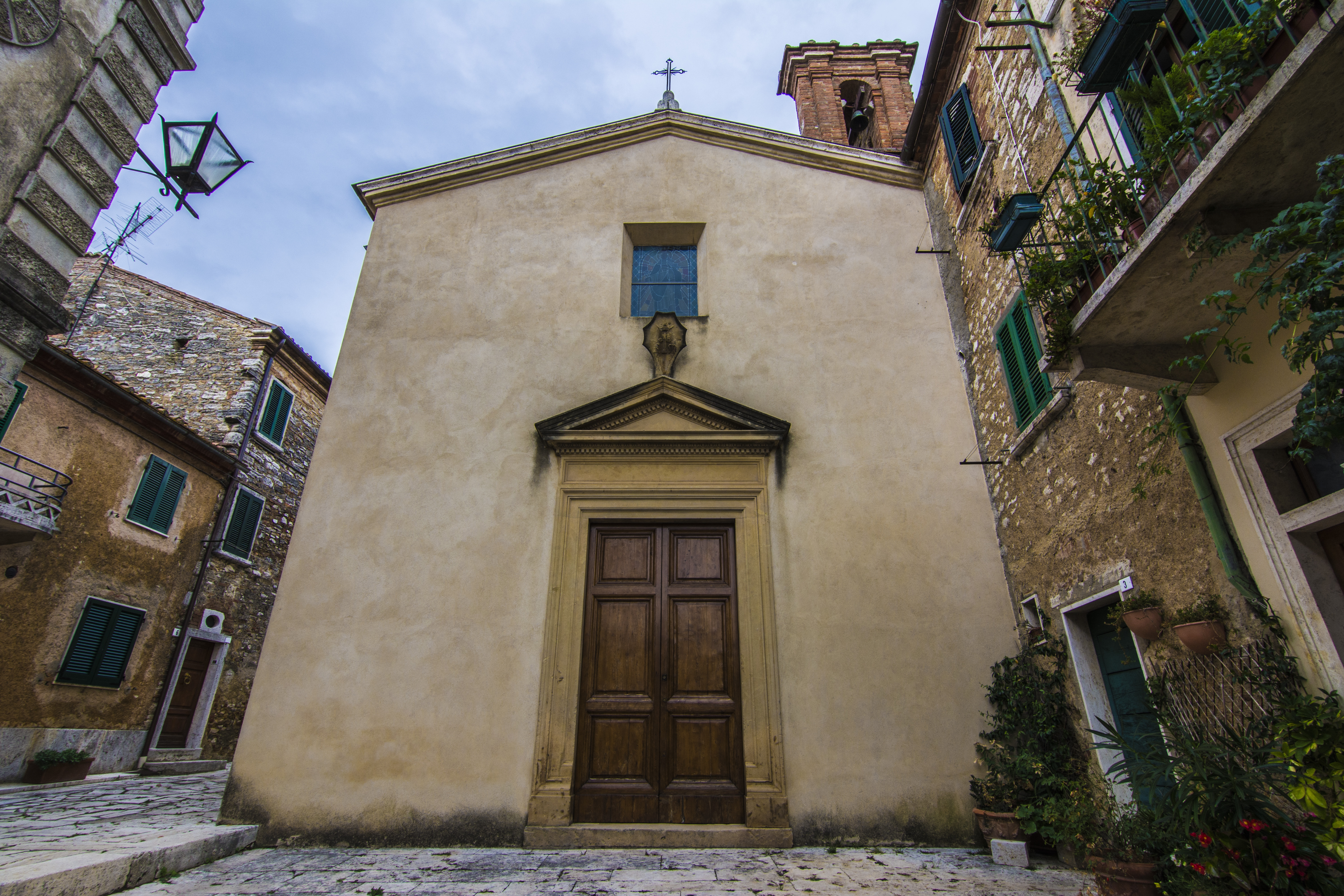 Chiesa della Misericordia di Santa Caterina This is a photo of a monument which is part of cultural heritage of Italy.